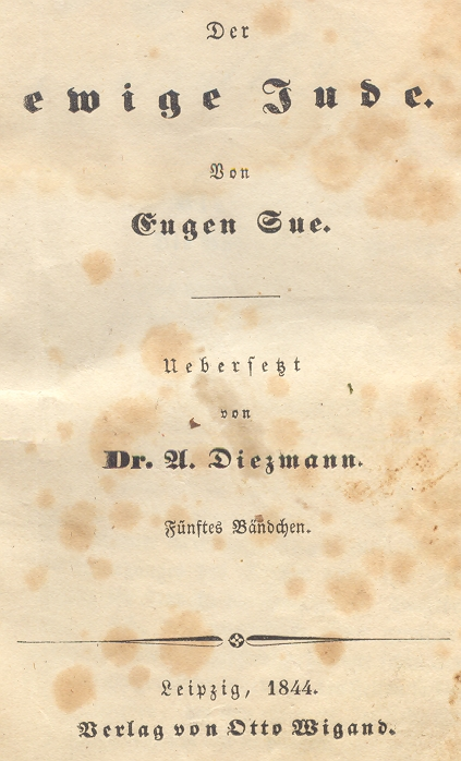 Der ewige Jude, Leipzig 1844 (Titelseite)